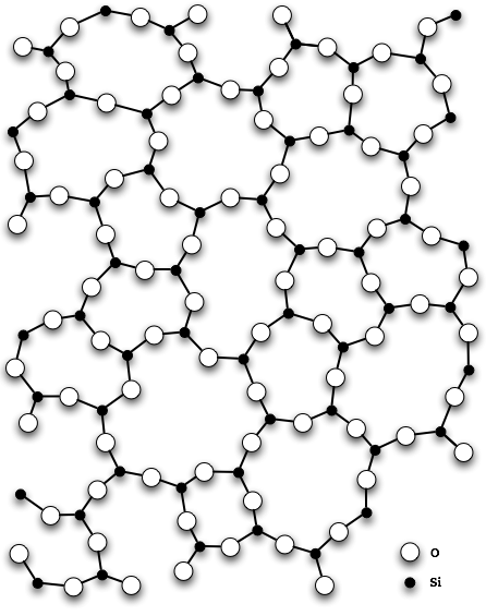 SiO2 as glas. 2D model.